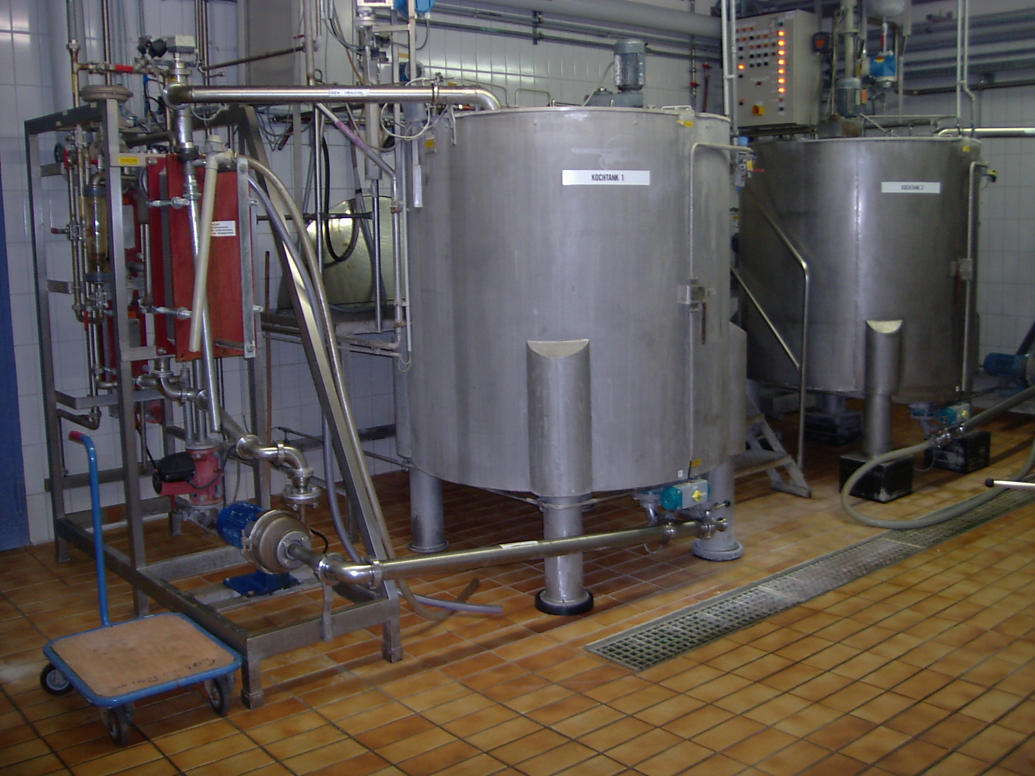 Caseinaufbereitung in einem ehemaligen Ätztechnik-Betrieb in Müllheim